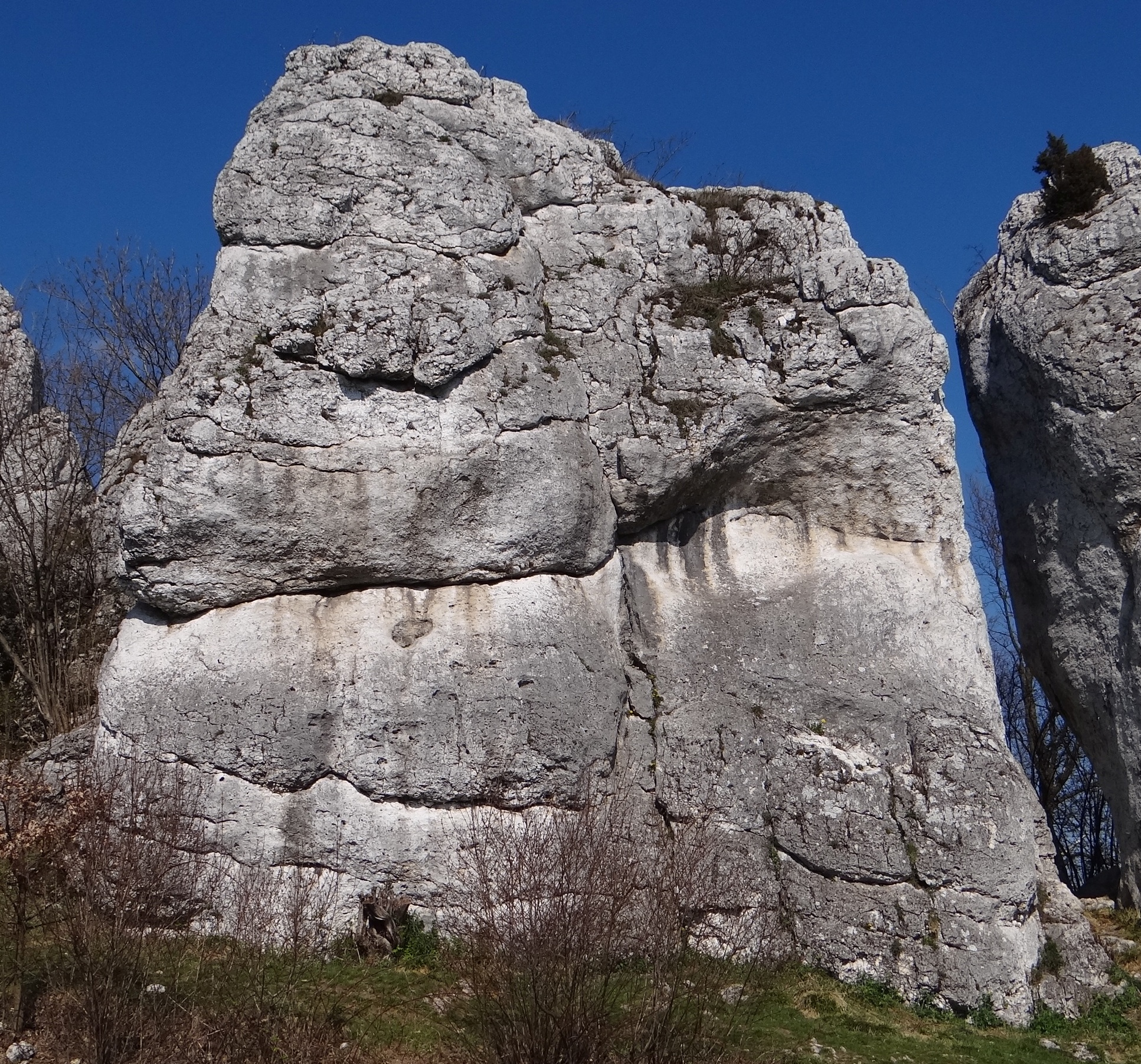 Skała Szeroki Komin w grupie Skał Słonecznych w Jerzmanowicach